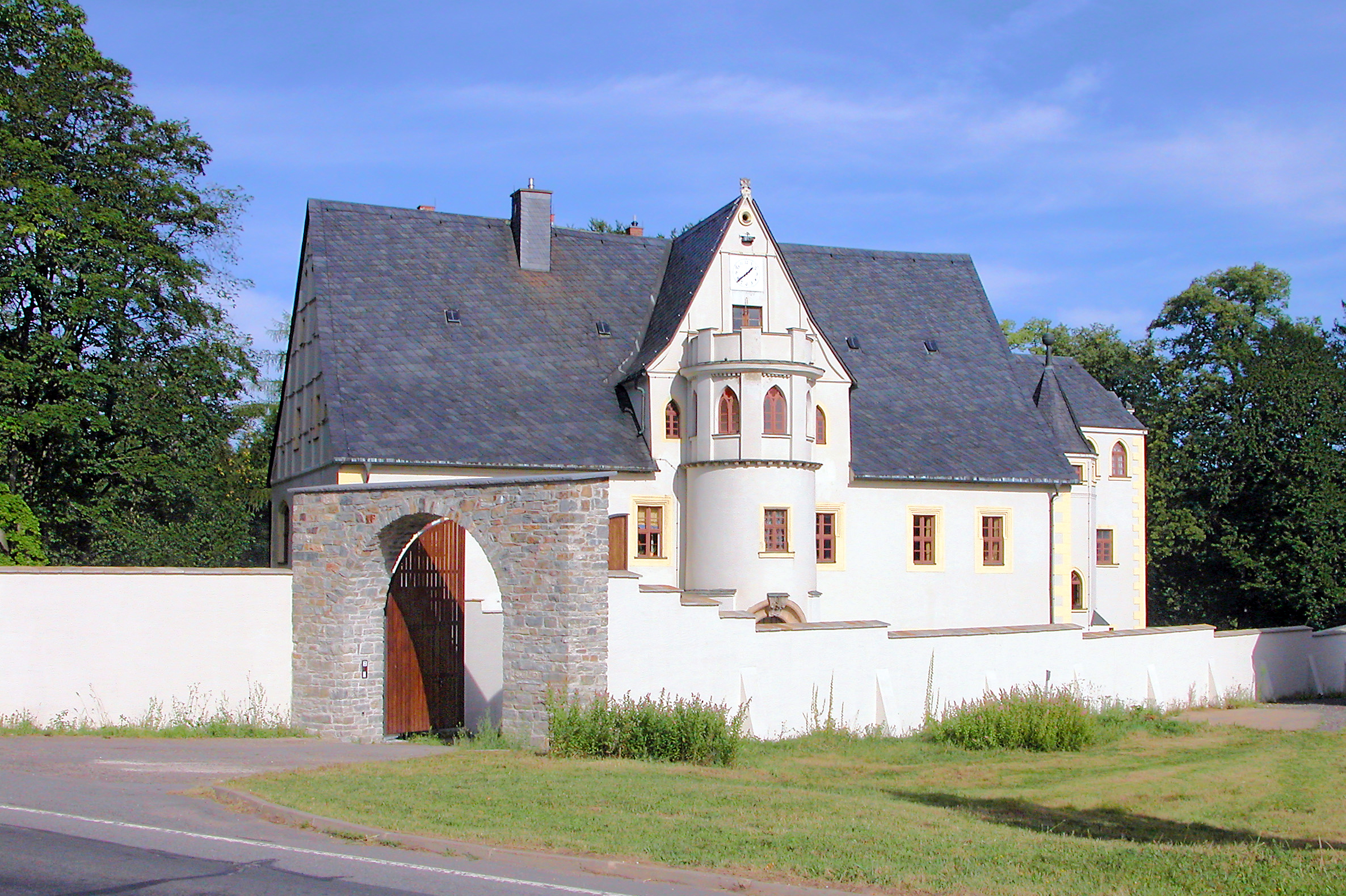 03.08.2006 09509 Forchheim (Pockau), Hauptstraße 2 (GMP: 50.724432,13.264687): Renaissanceschloß Niederforchheim, 1558 für Christoph von Berbisdorf erbaut. Im Dritten Reich Jagdsitz des sächsischen Gauleiters Martin Mutschmann. In der DDR Kindergarten. 1998 privatisiert, nicht öffentlich zugänglich. Südseite. [DSCN10817.TIF]20060803105DR.JPG(c)Blobelt